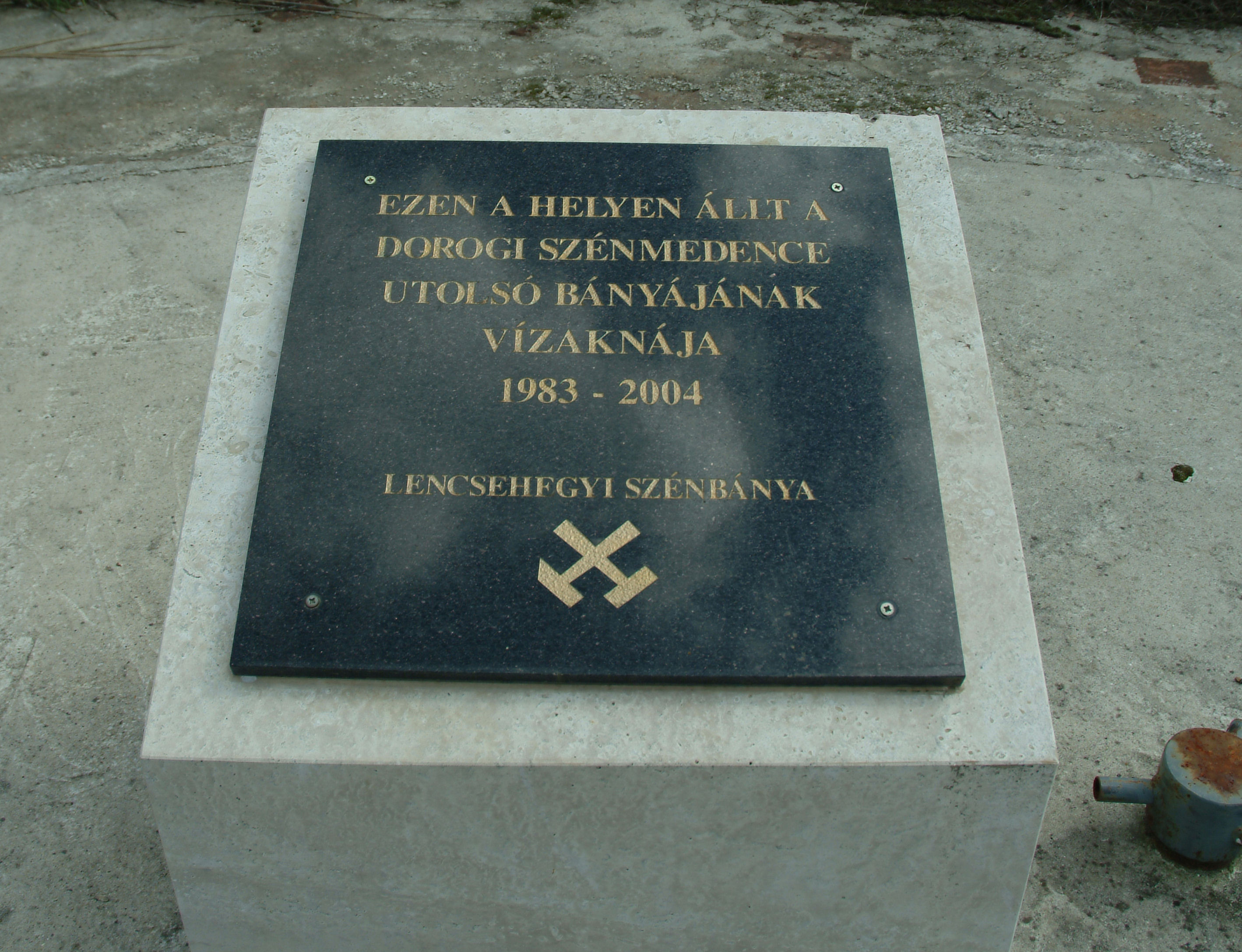 A Lencsehegyi szénbánya vízaknáját jelző emléktábla a Dobogókői út mentén, a Méhes-völgyben